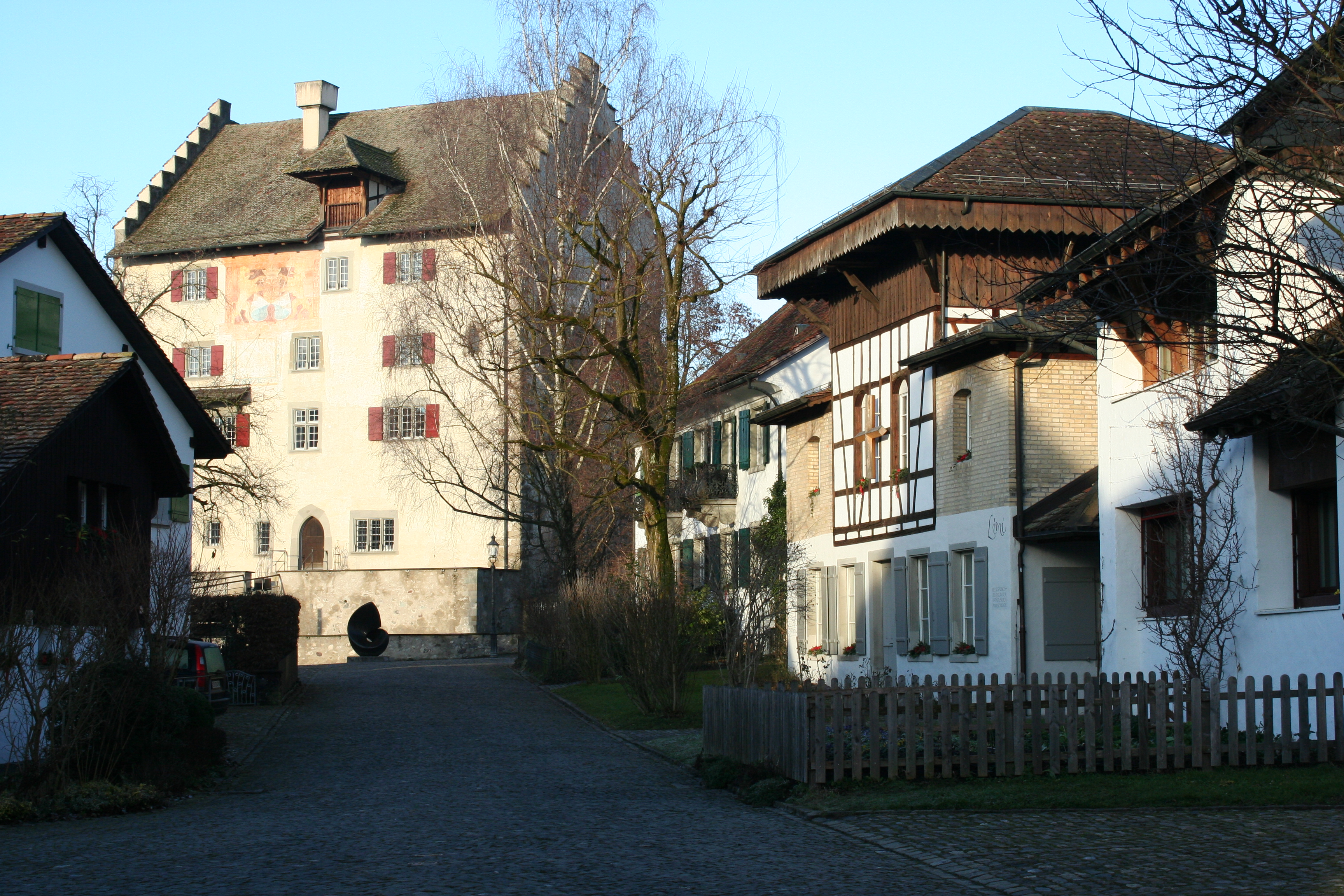 Römisch-katholische Kirche Johannes XXIII. in Greifensee, im Hintergrund das Schloss Greifensee